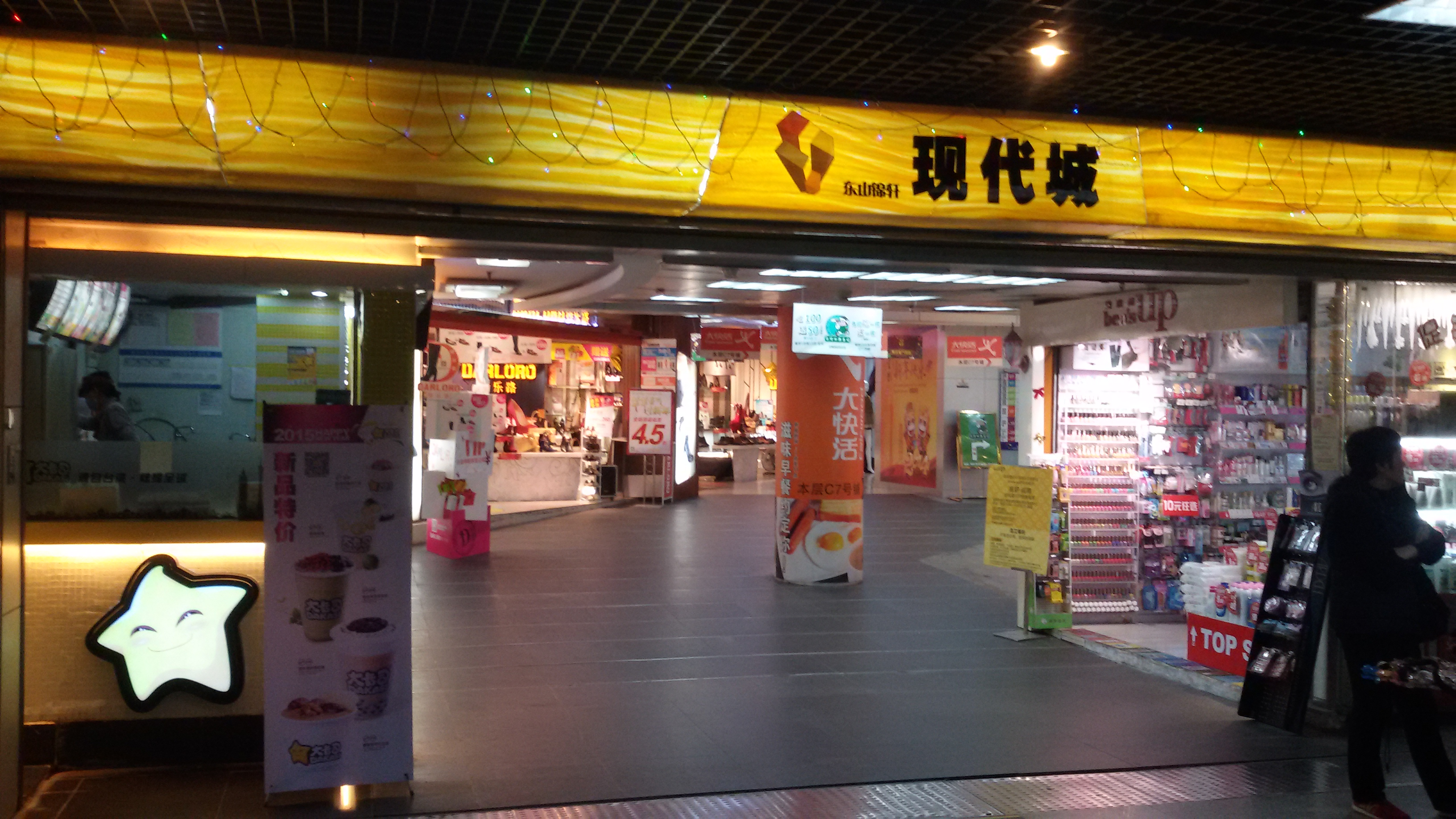 粵語: 東山錦軒現代城嘅地下商場入口